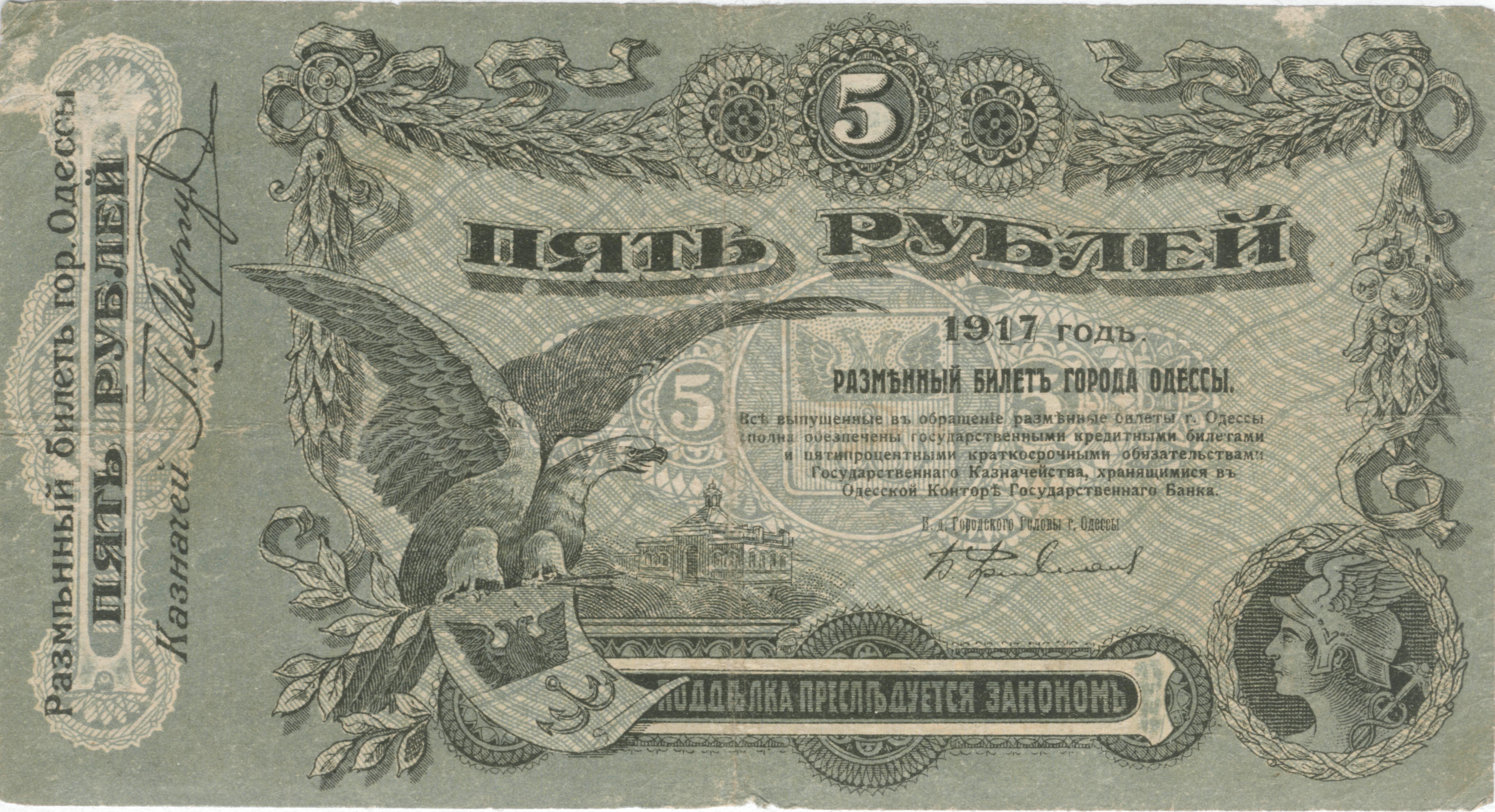 Одесские деньги - 5 рублей, аверс. 1917